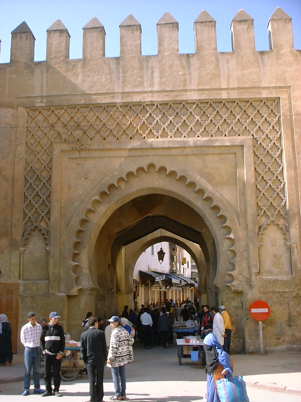 Bab Semmarine